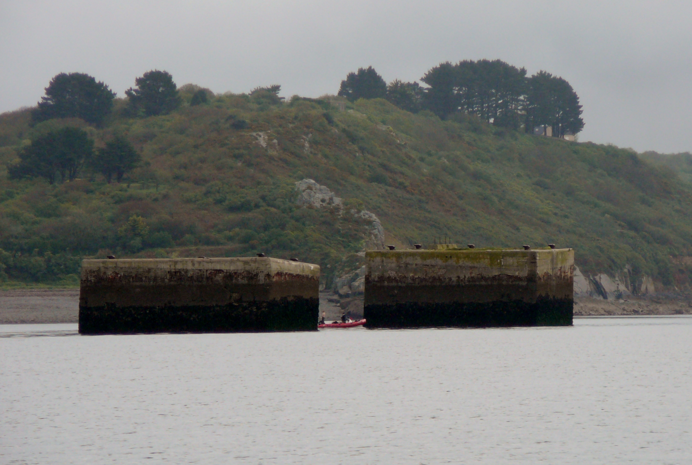 Bricole per la Bismarck